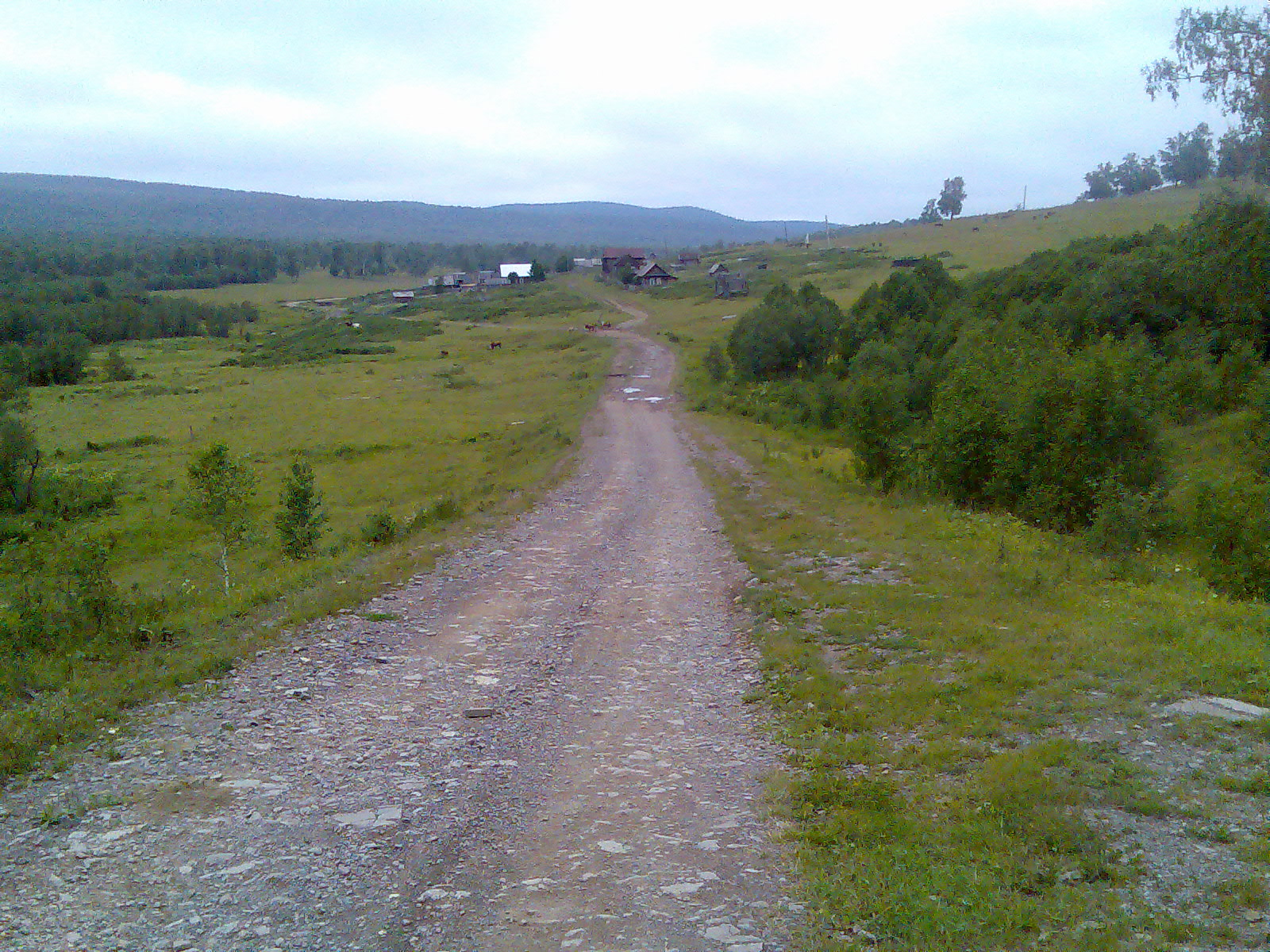 Въезд в Аисово